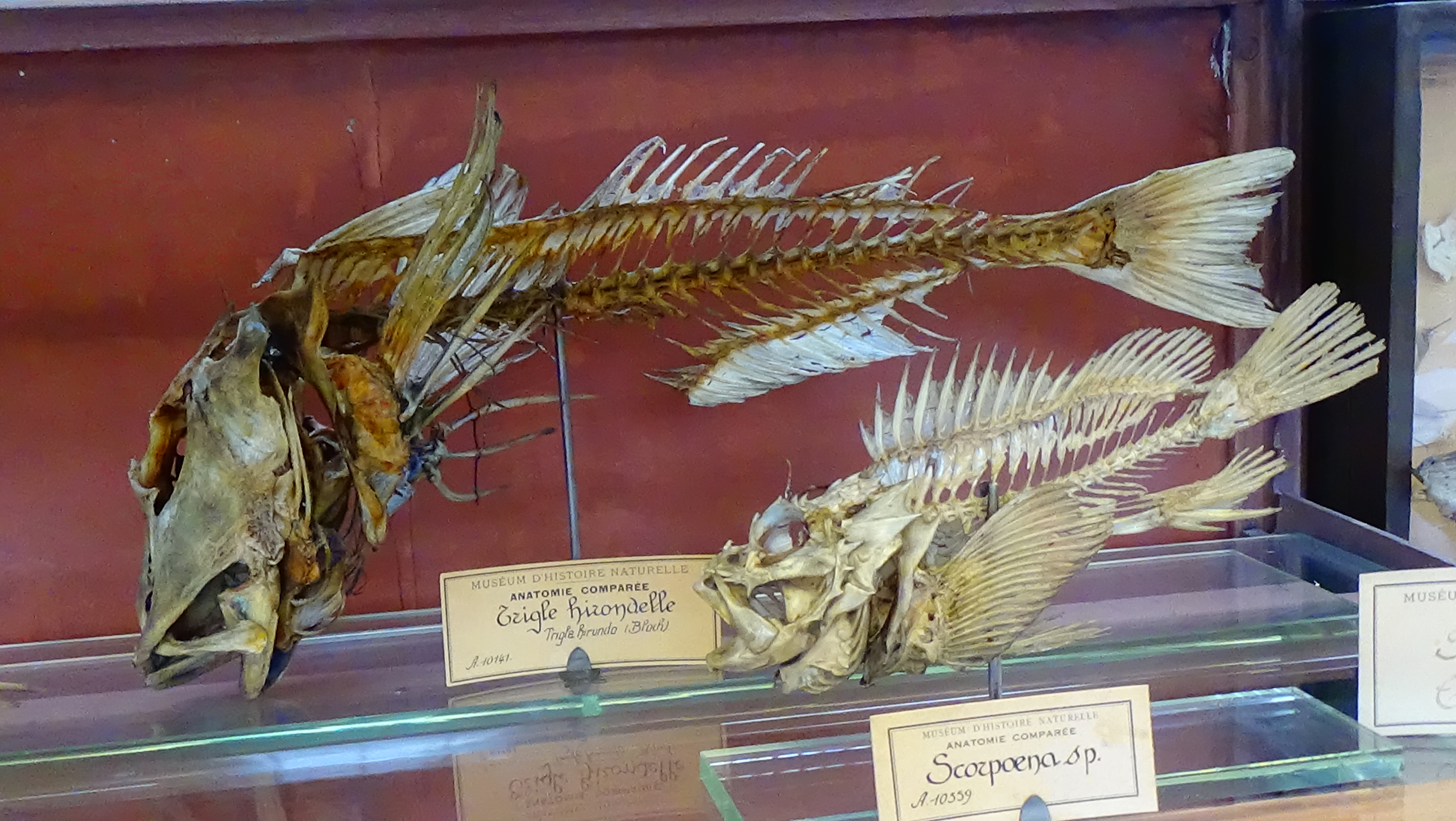 Chelidonichthys lucerna (Trigla hirundo) et Scorpaena sp - squelettes mnhn Paris